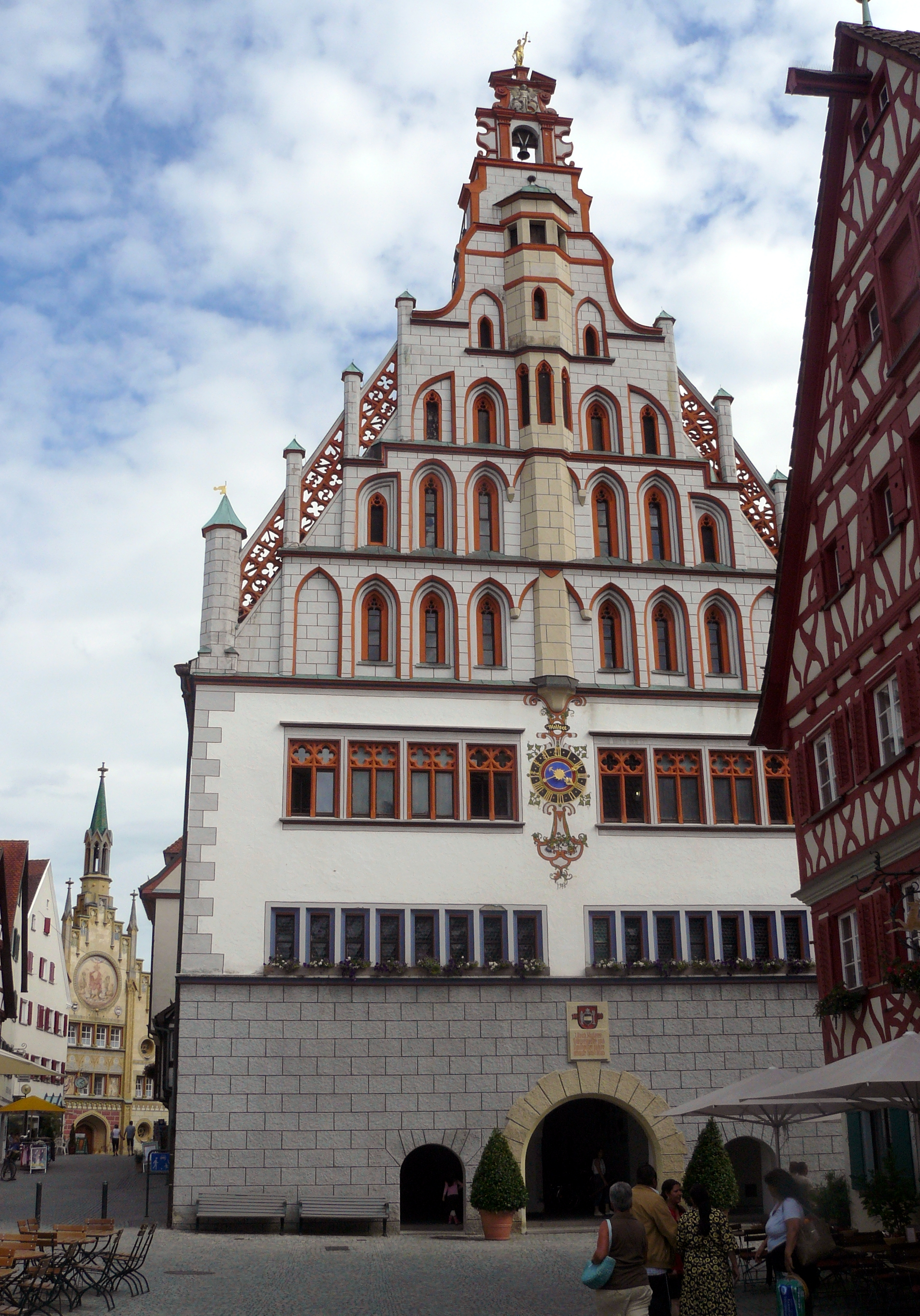 Rathaus Bad Waldsee